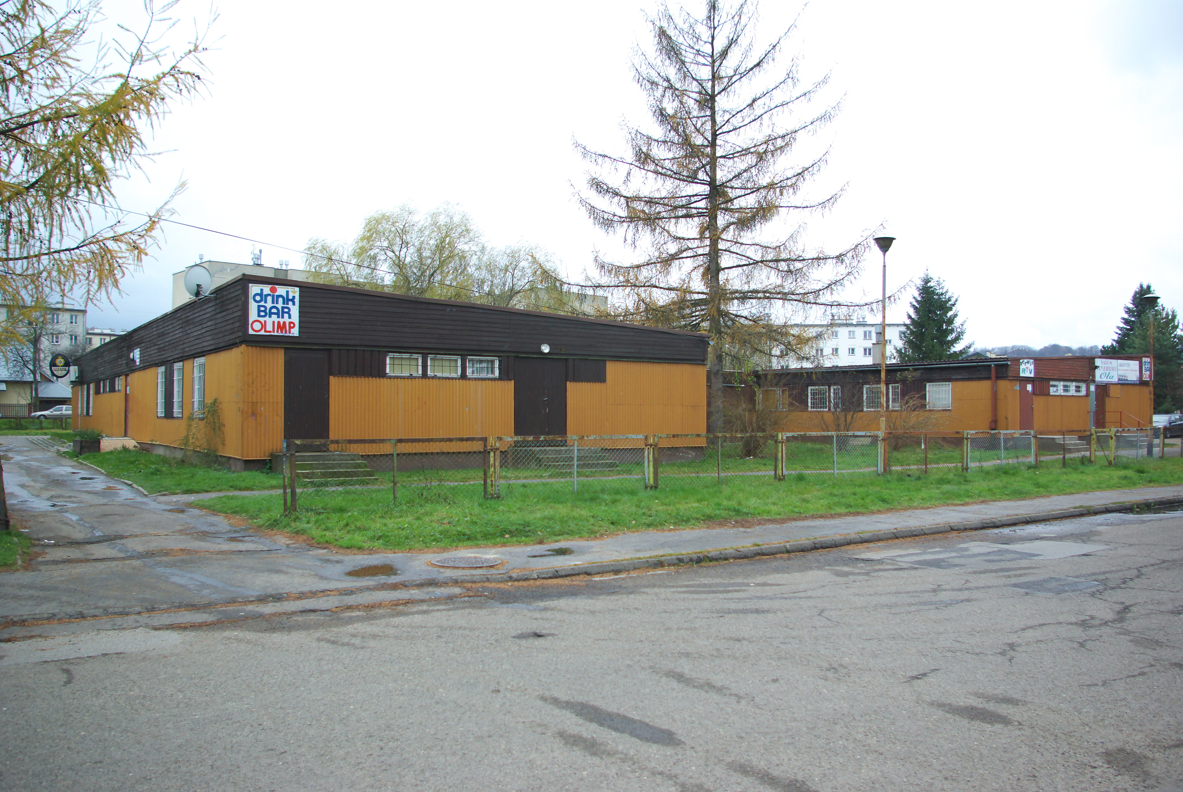 Budynek przy ulicy Kwiatowej 25 w Sanoku